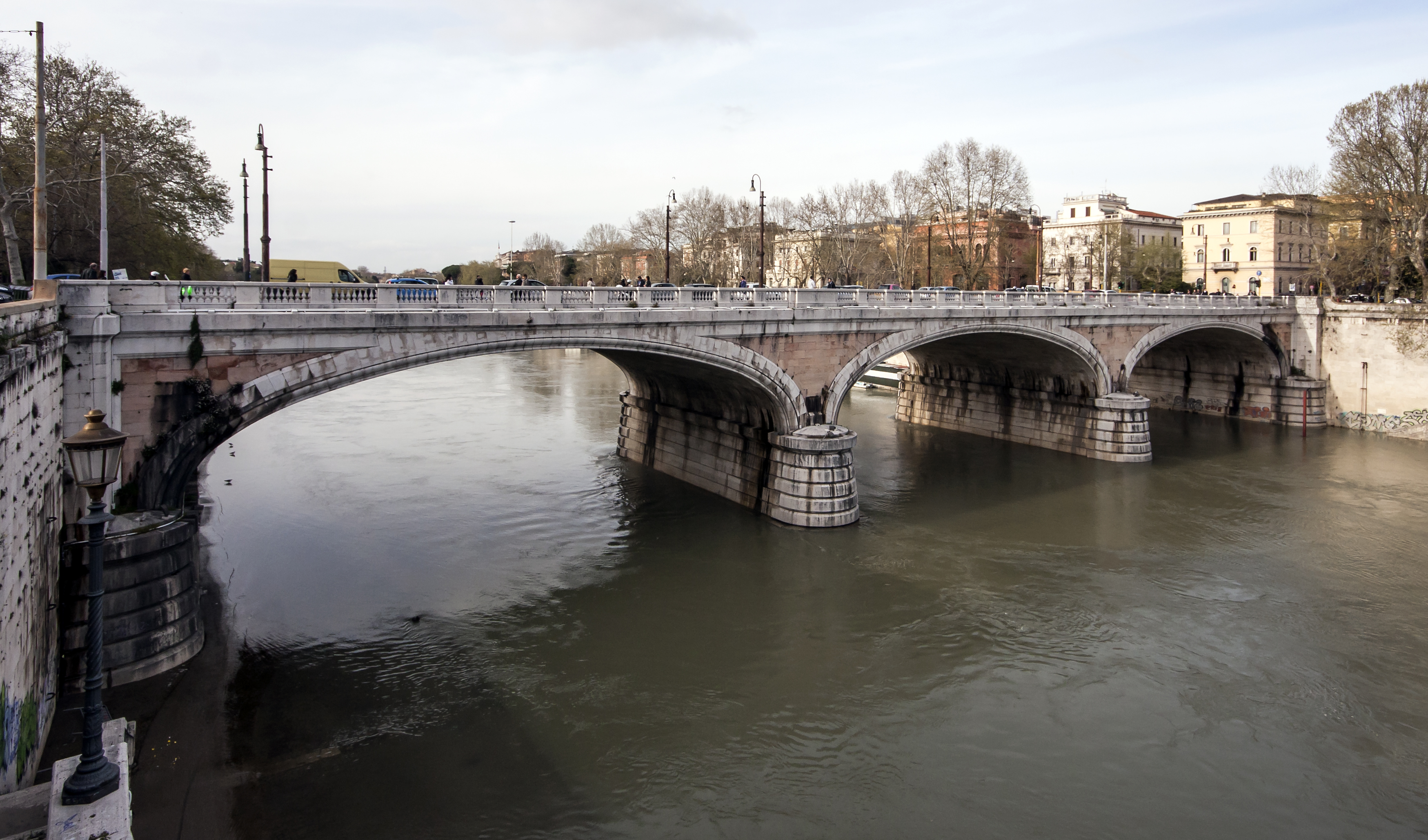 Ponte Regina Margherita, en av Roms broar över Tibern.